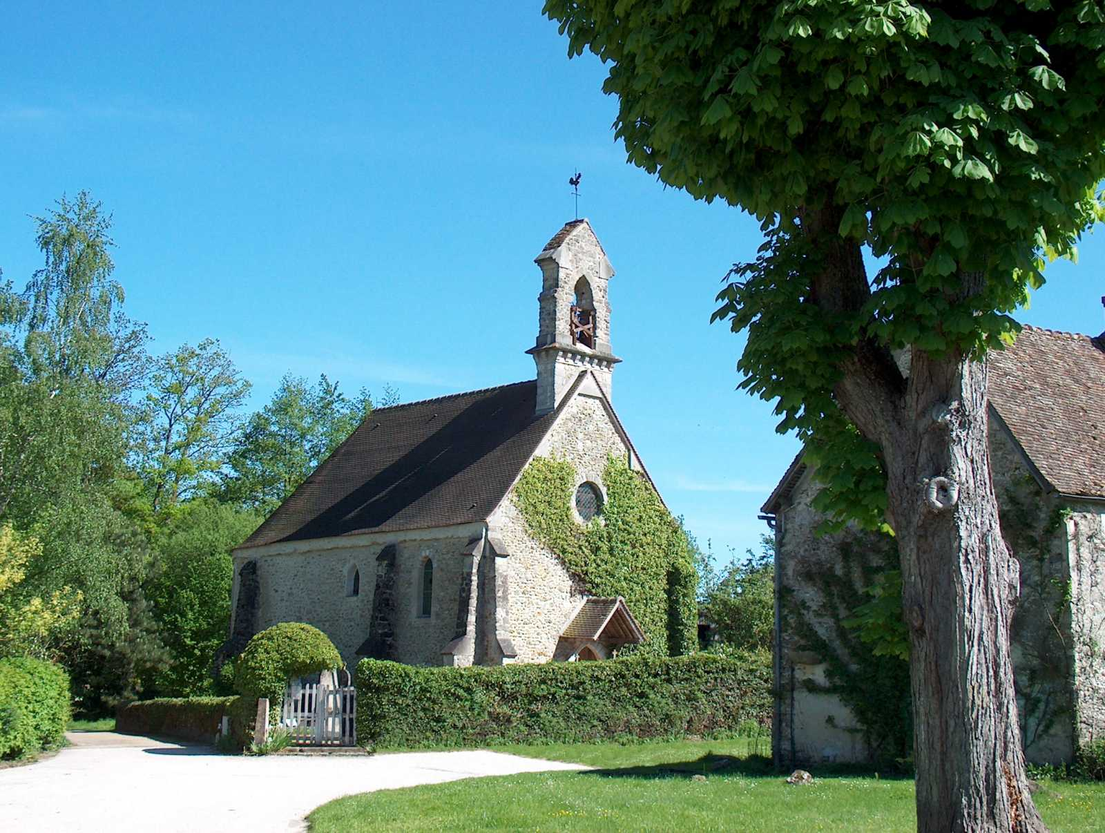 Église de Gambaiseuil (Yvelines, France)